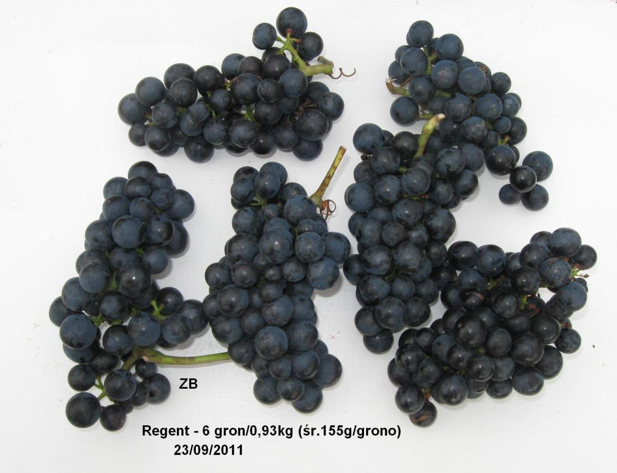 Masa gron odmiany regent